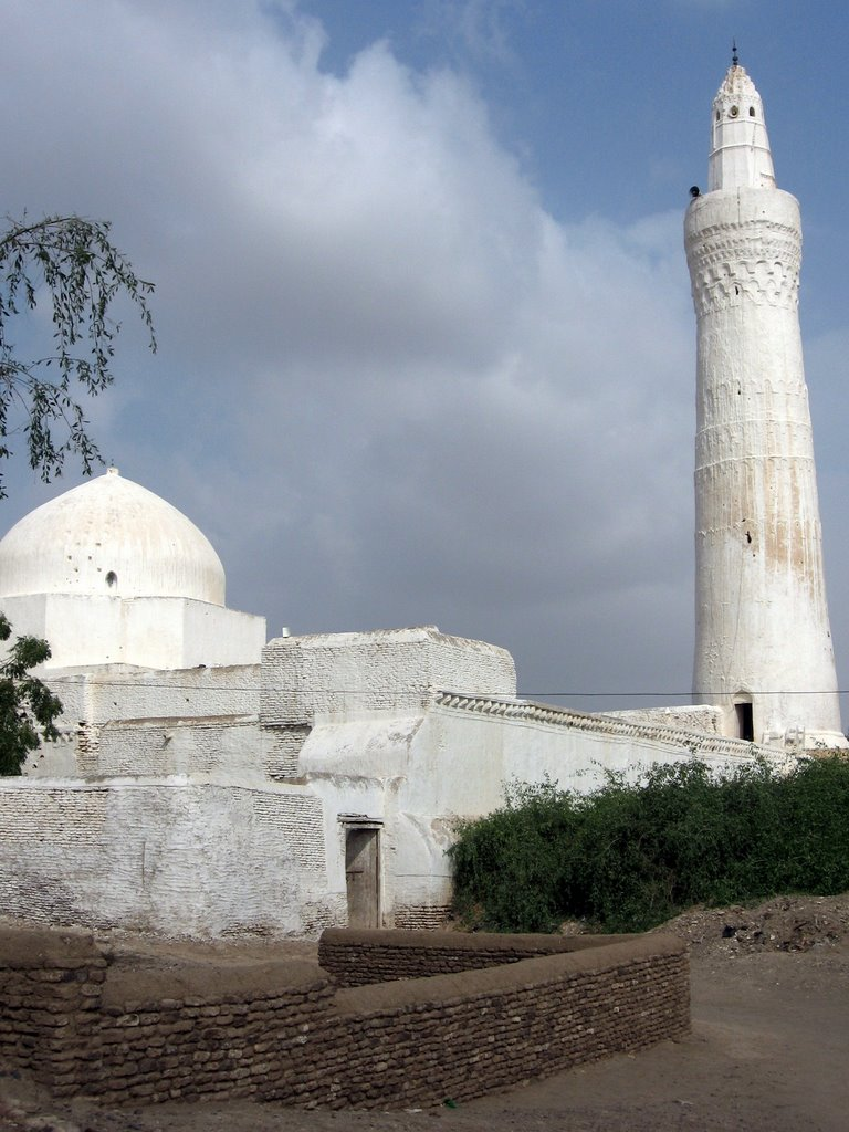 Mosque in Zabid